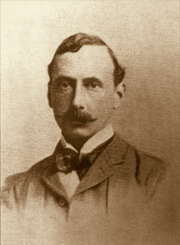 Herbert James Draper (1870-1920)